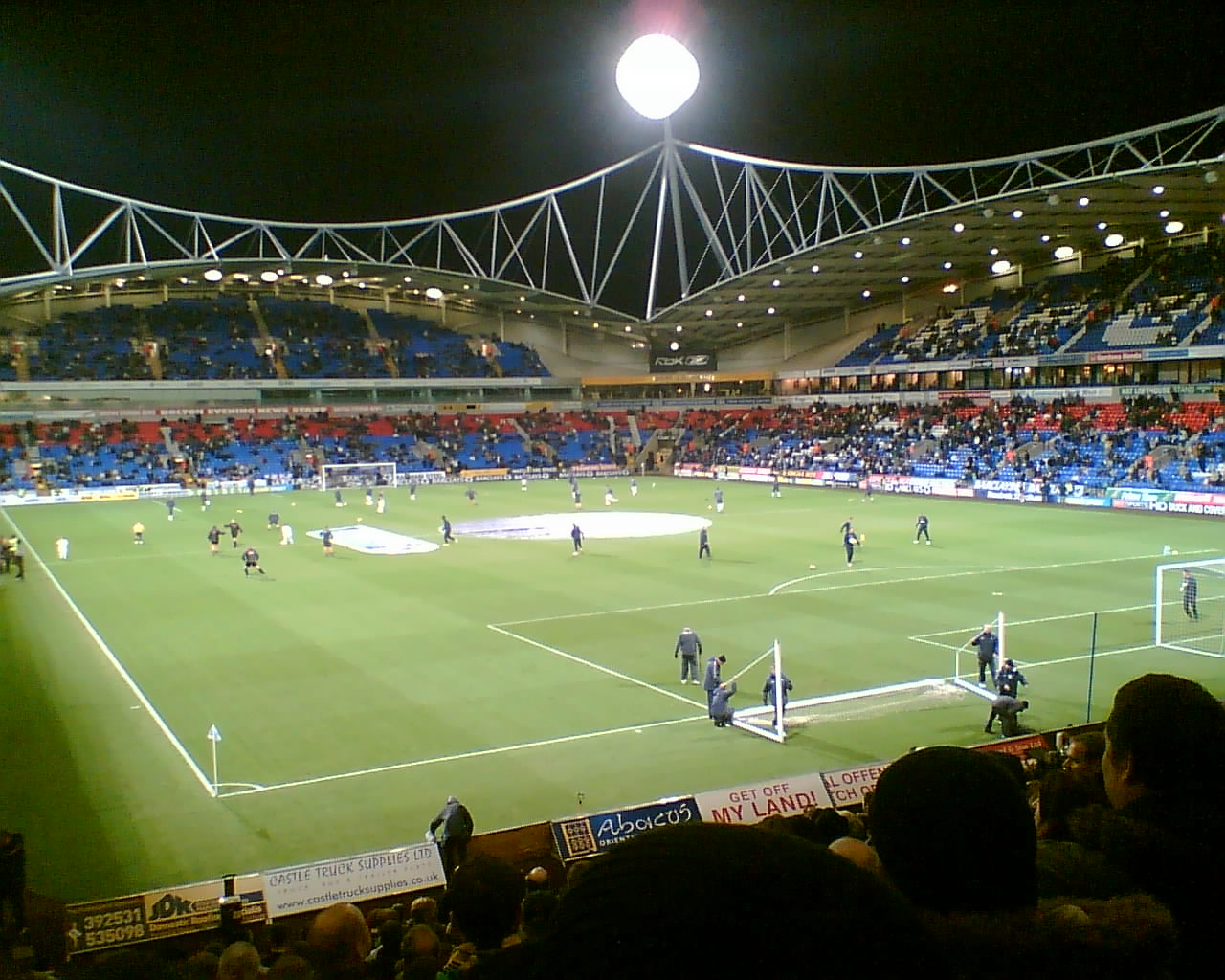 pre-Bolton vs. Arsenal, 2006